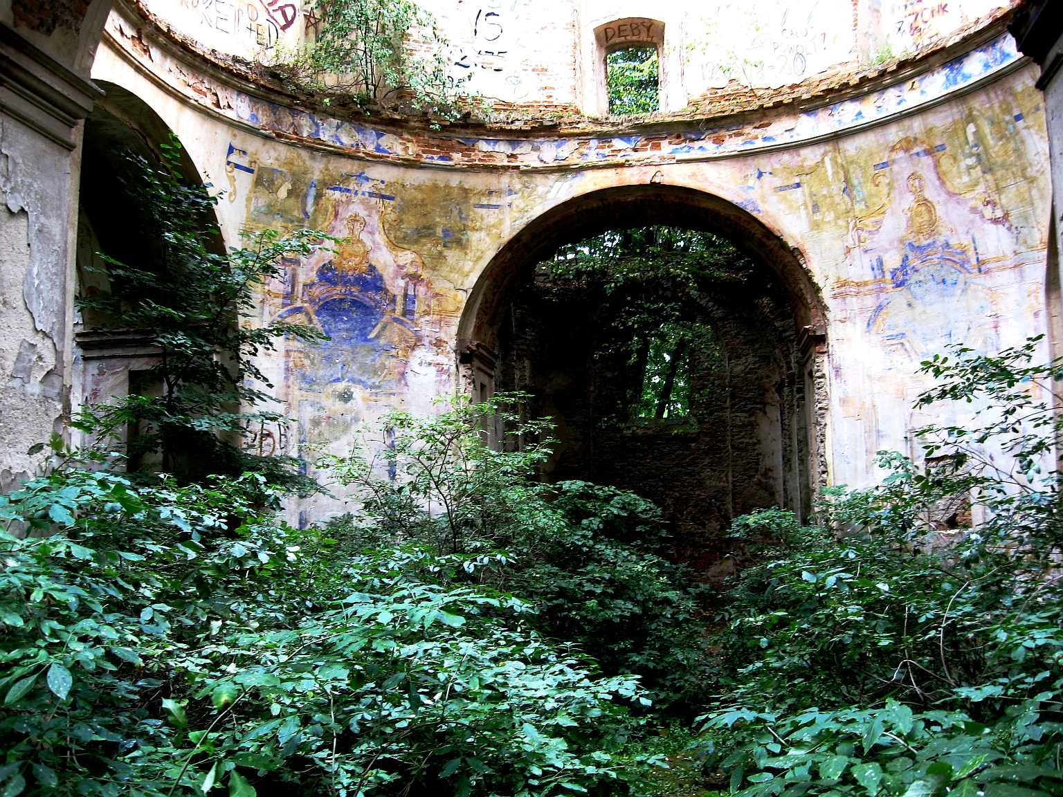 Ruiny cerkwi prawosławnej we wsi Kniazie, gmina Lubycza Królewska